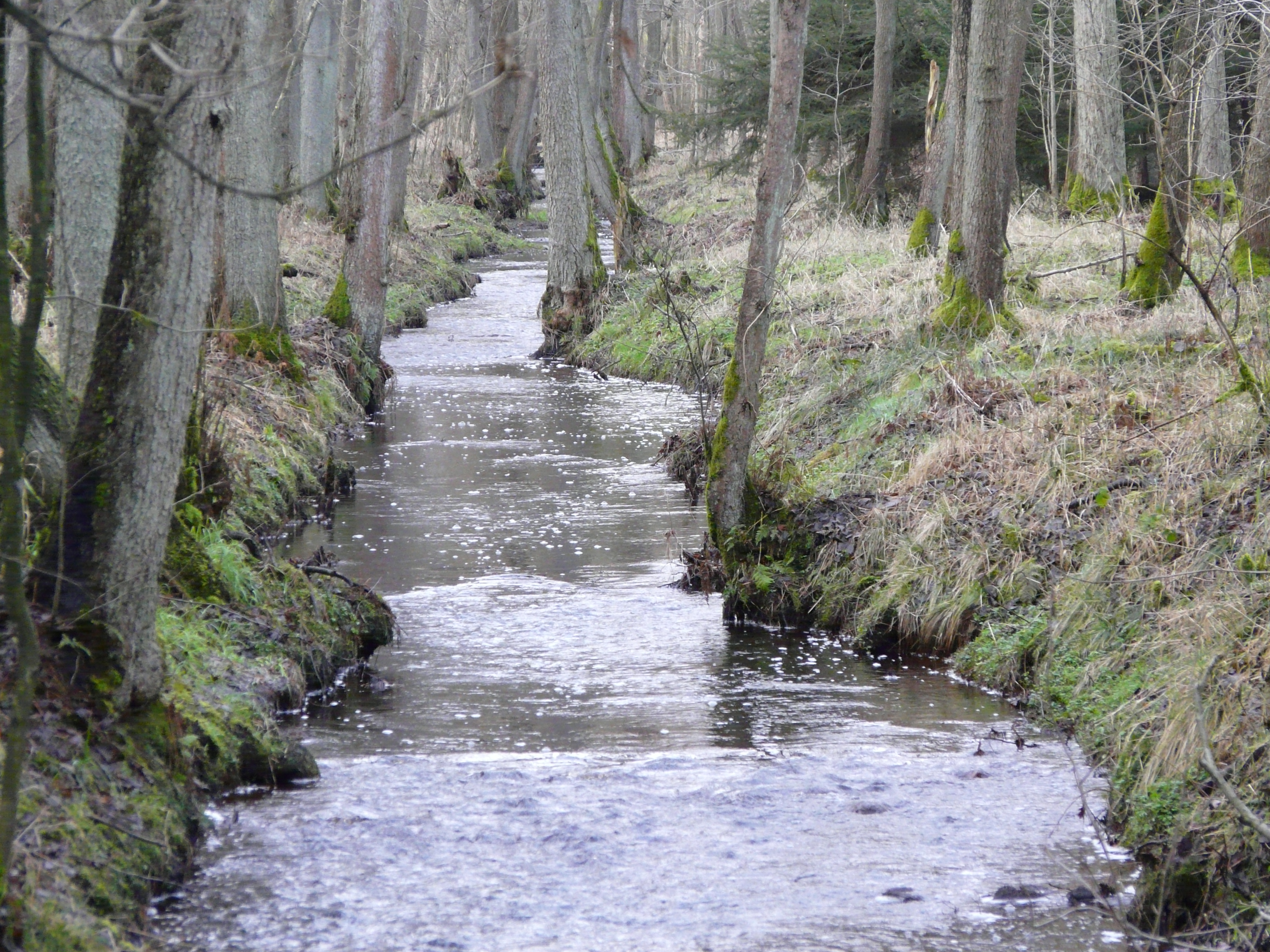 River Fulde in Walsrode